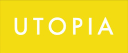 Capture d'écran d'un épisode de la série.